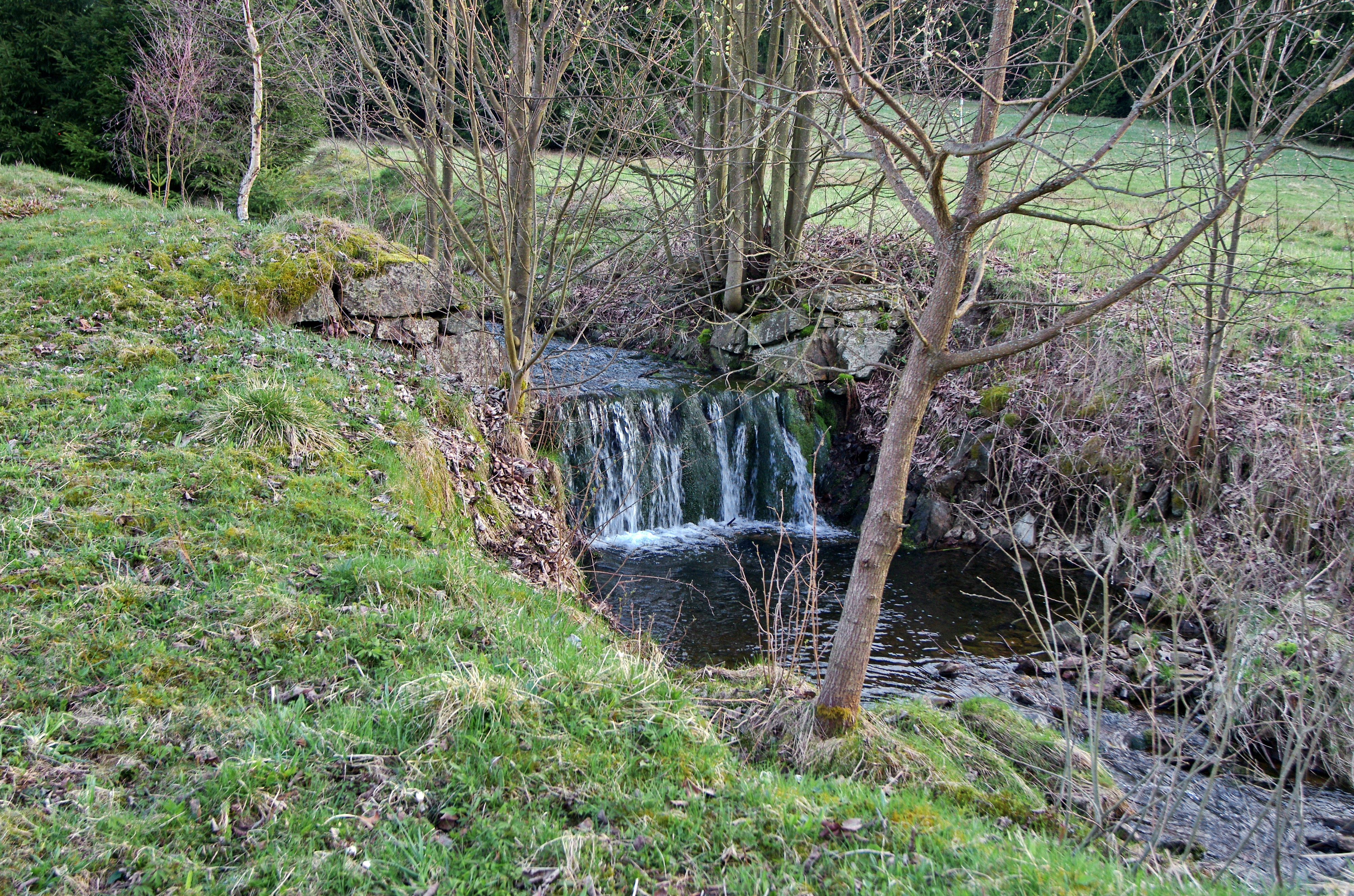 Hrazený potok, přítok Zlatého potoka v osadě Zlatý Kopec, v místě kde dříve stála stará stoupovna, Krušné hory, okres Karlovy Vary